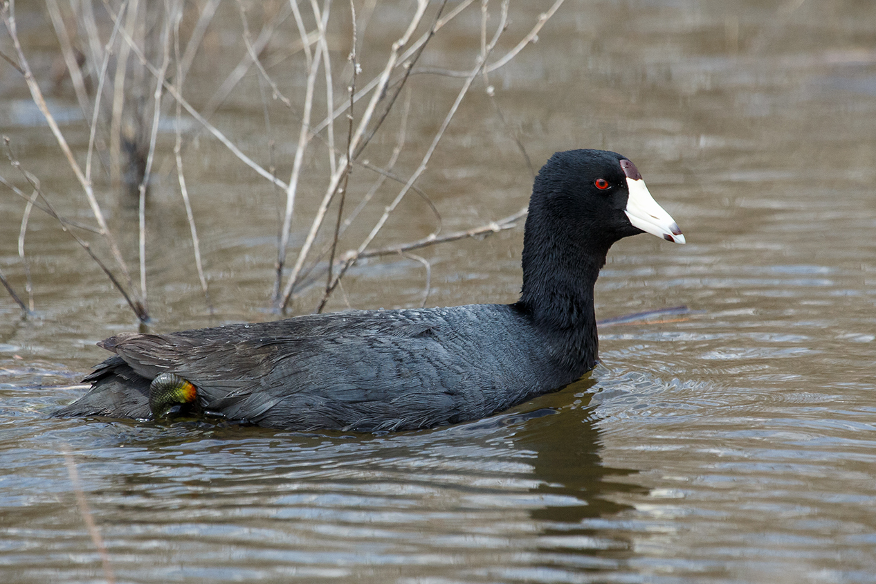 Американская лысуха в весеннее половодье